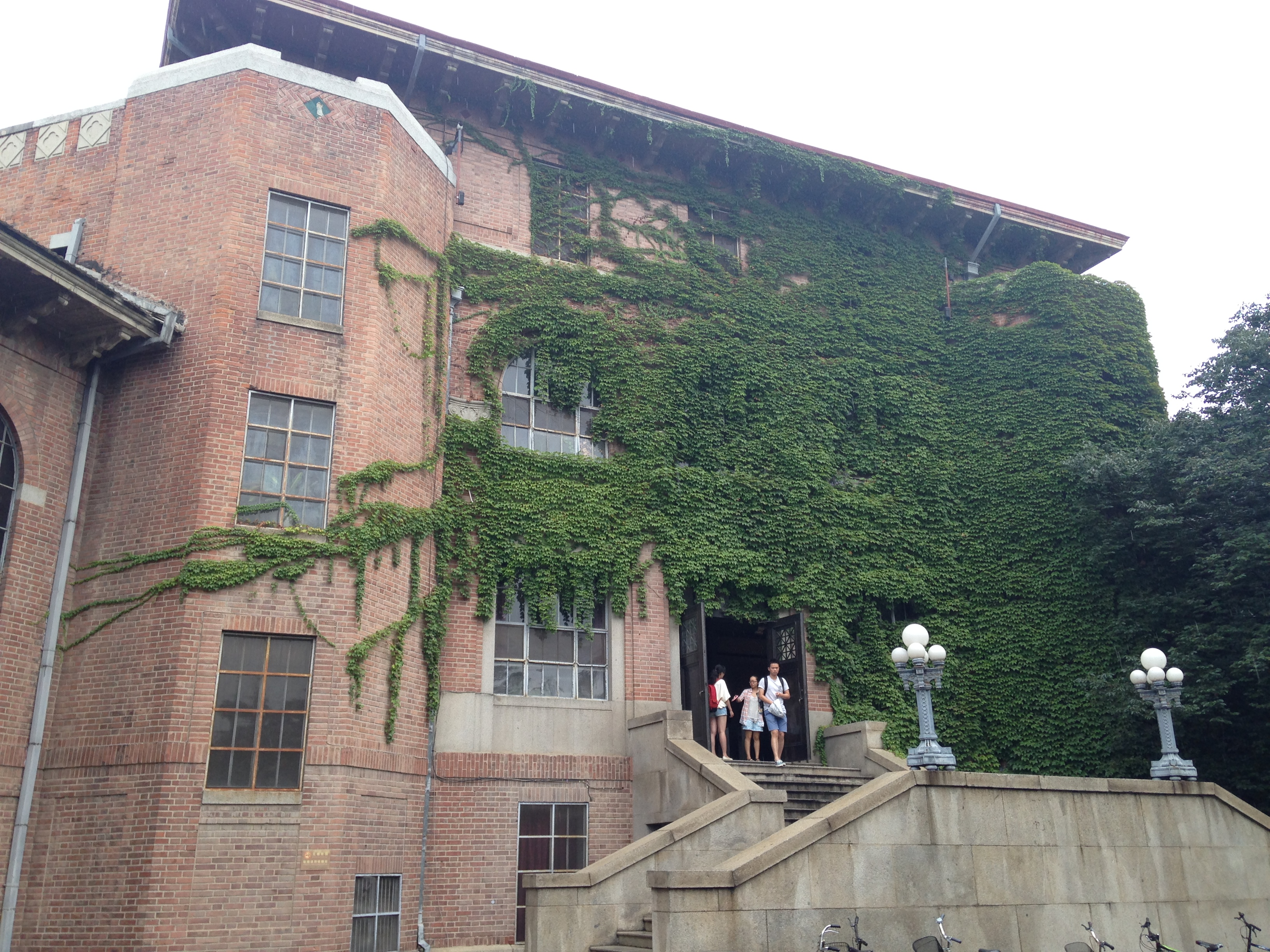 清華大学・旧図書館